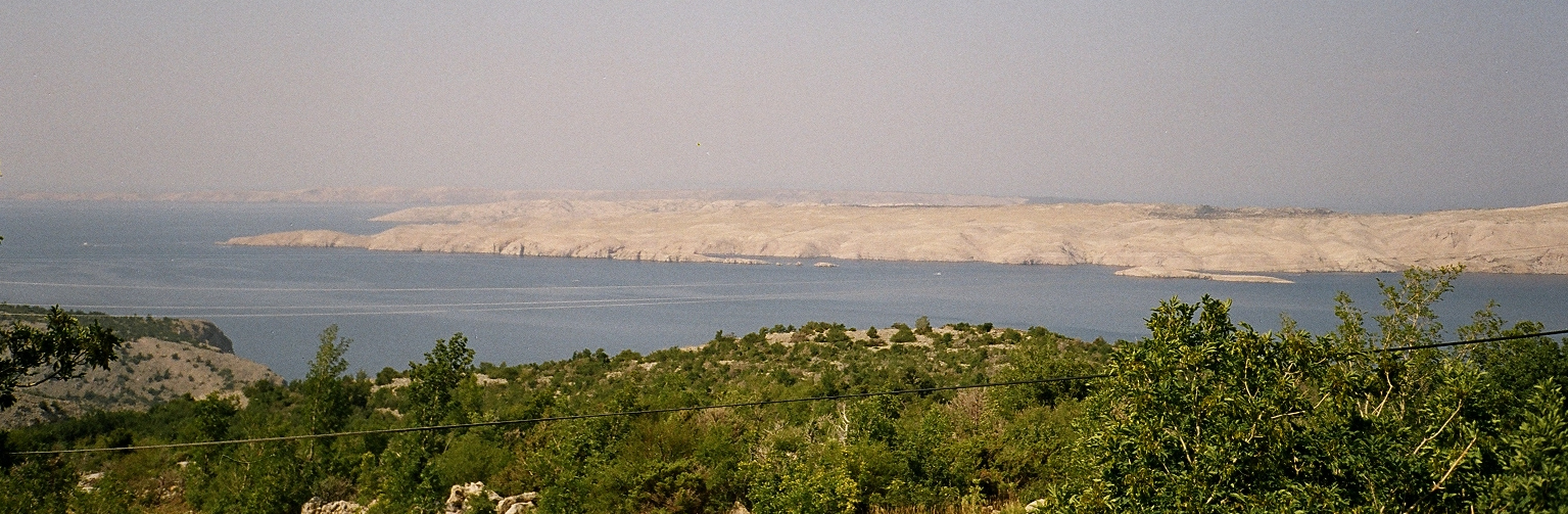 Rab island looking from the continent/Rabo sala žvelgiant nuo Adrijos magistralės